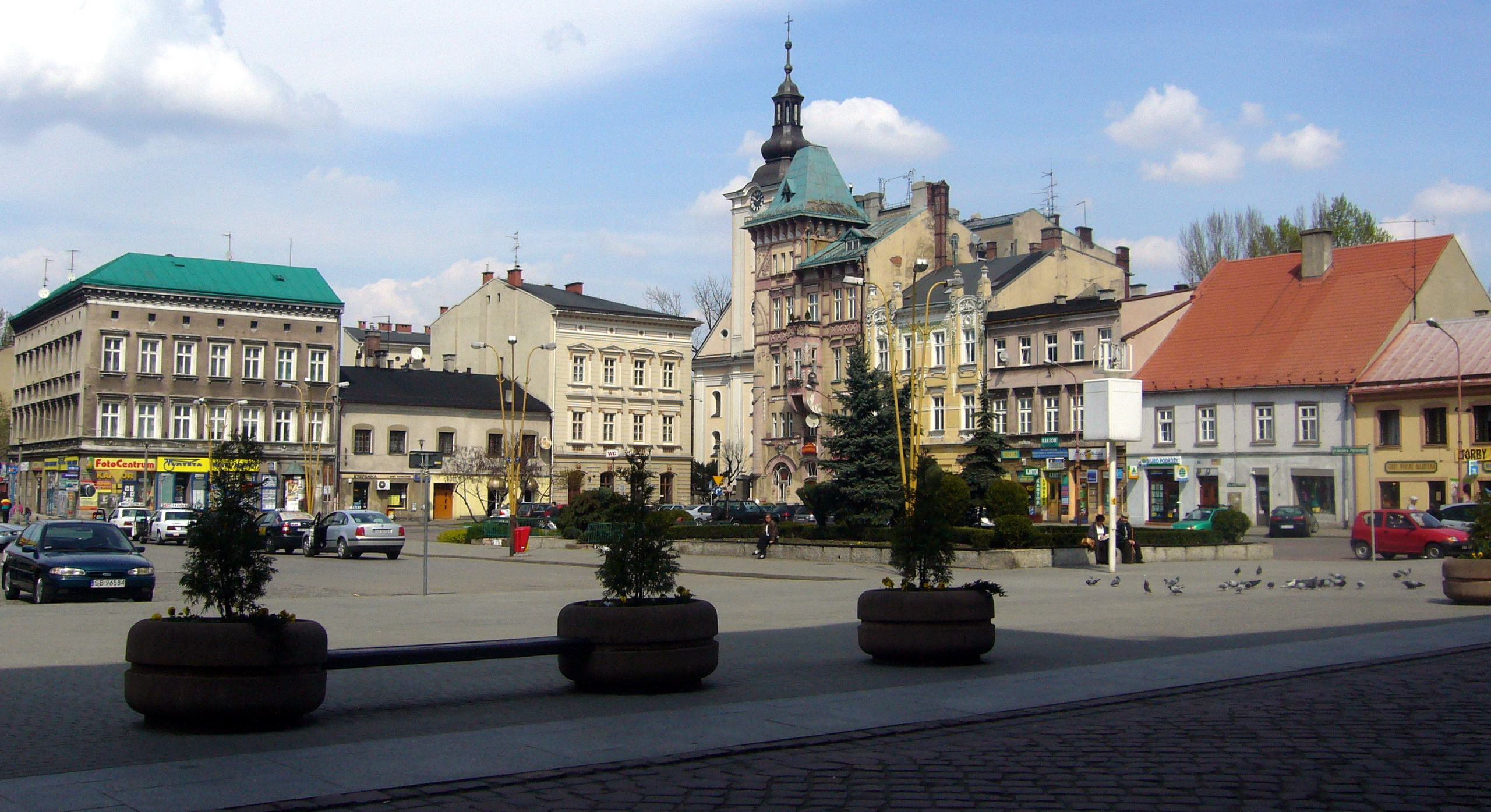 Plac Wojska Polskiego w Bielsku-Białej